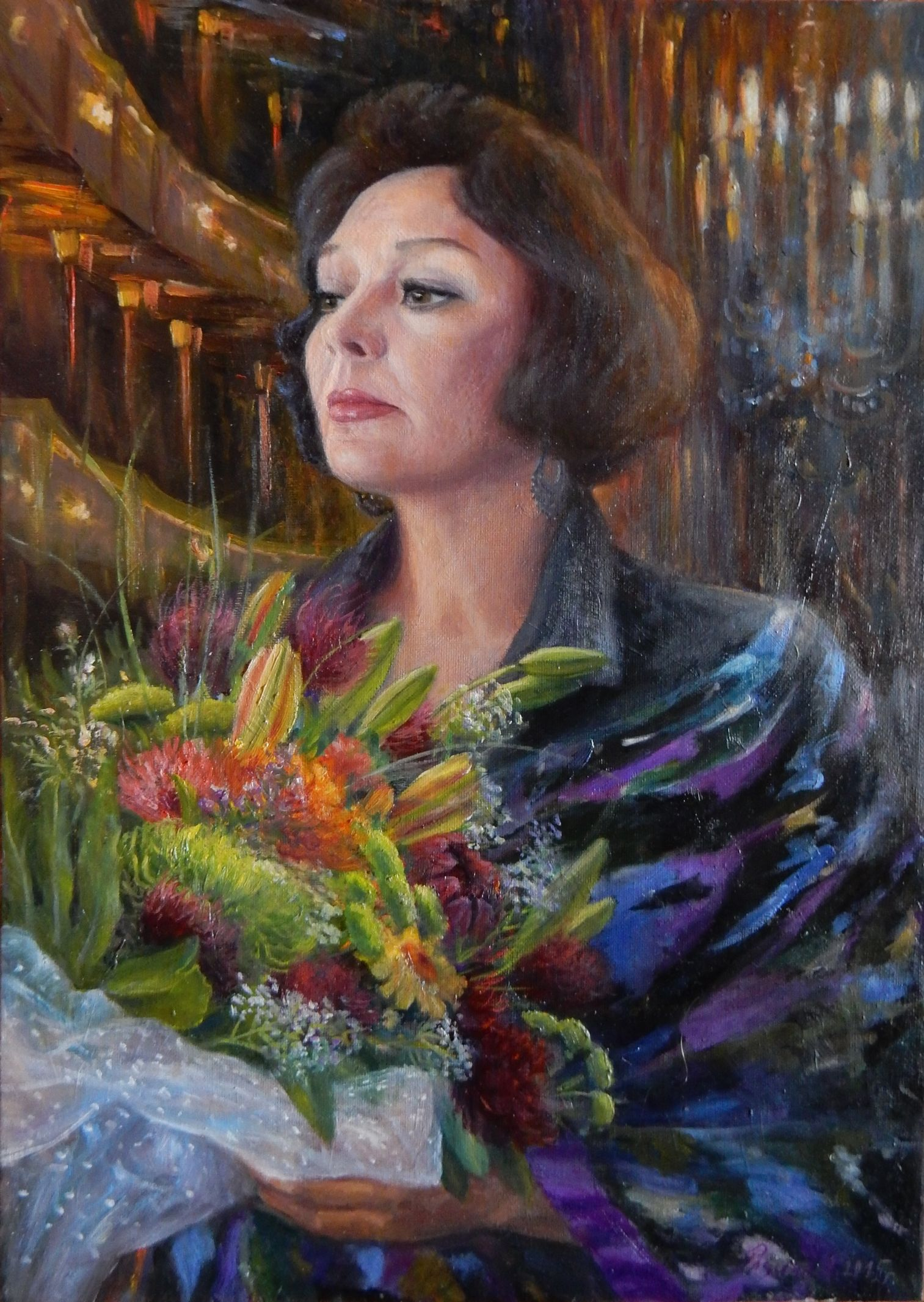 Актриса Рыбинского драматичеcкого театра Светлана Колотилова. 2015 г. Холст, масло, 70х50 см